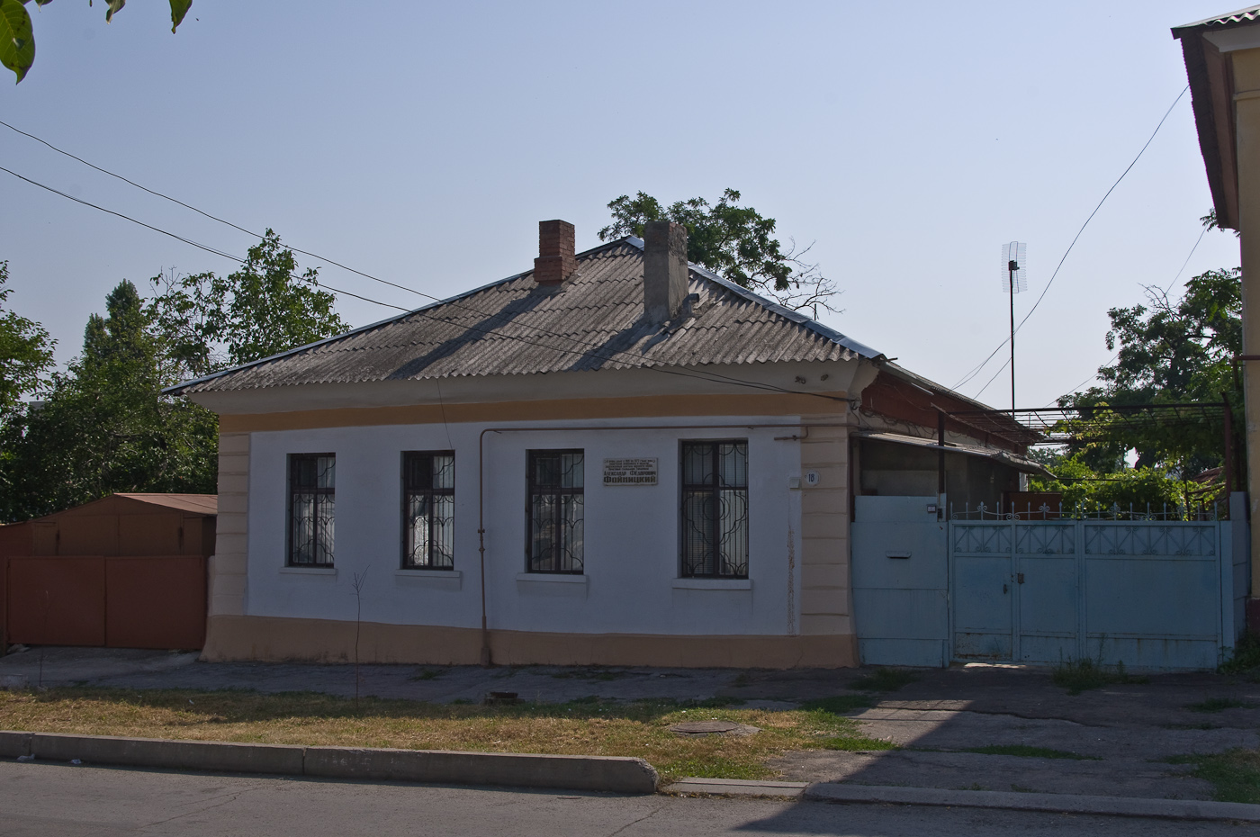 В этом доме с 1921 по 1973 годы жил советский живопсец и педагог, заслуженный деятель искусств МССР, Почётный гражданин Тирасполя Александр Фёдорович Фойницкий.